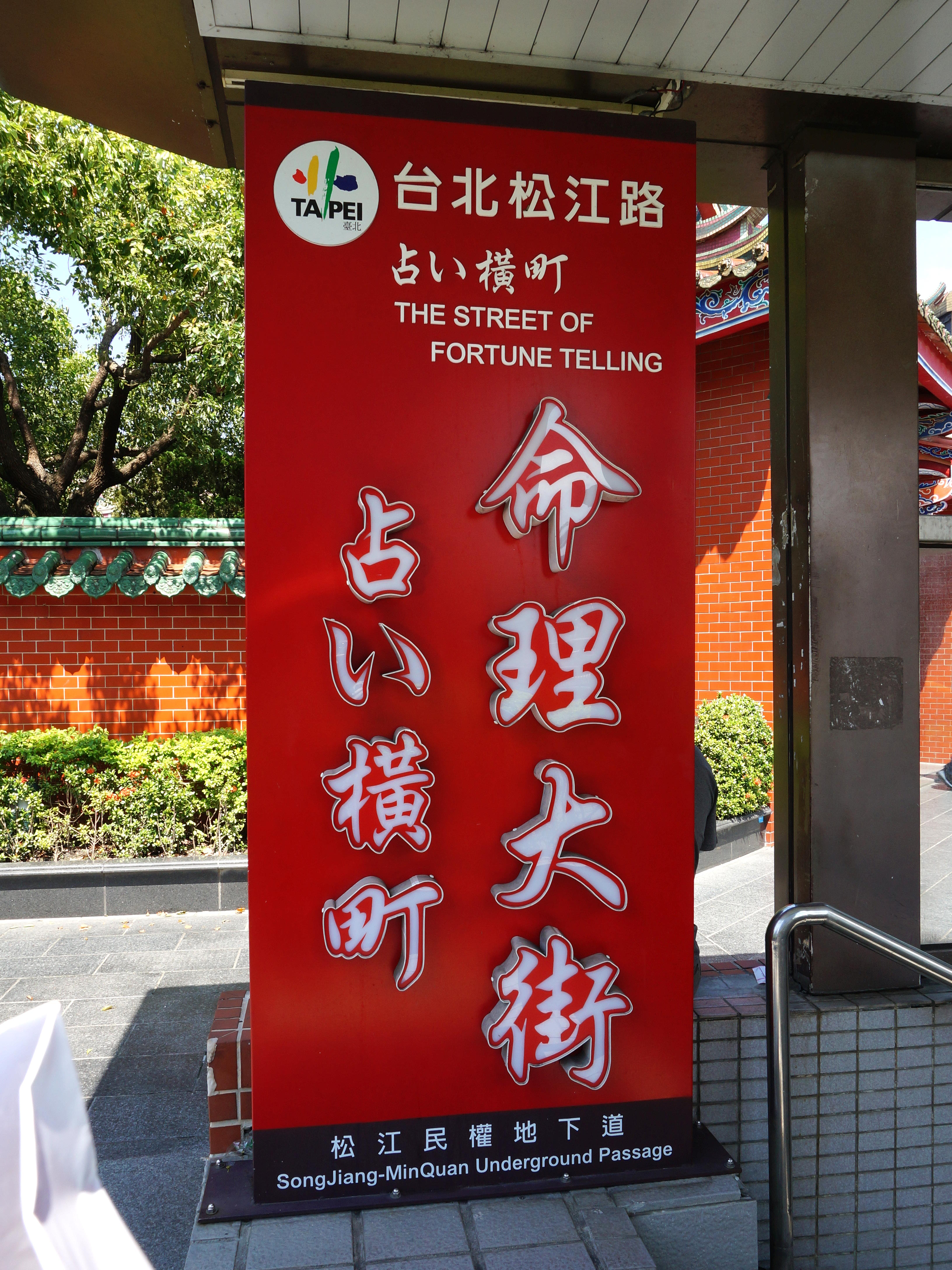 臺北市松江民權地下道「命理大街」燈箱，位於行天宮外圍人行道。